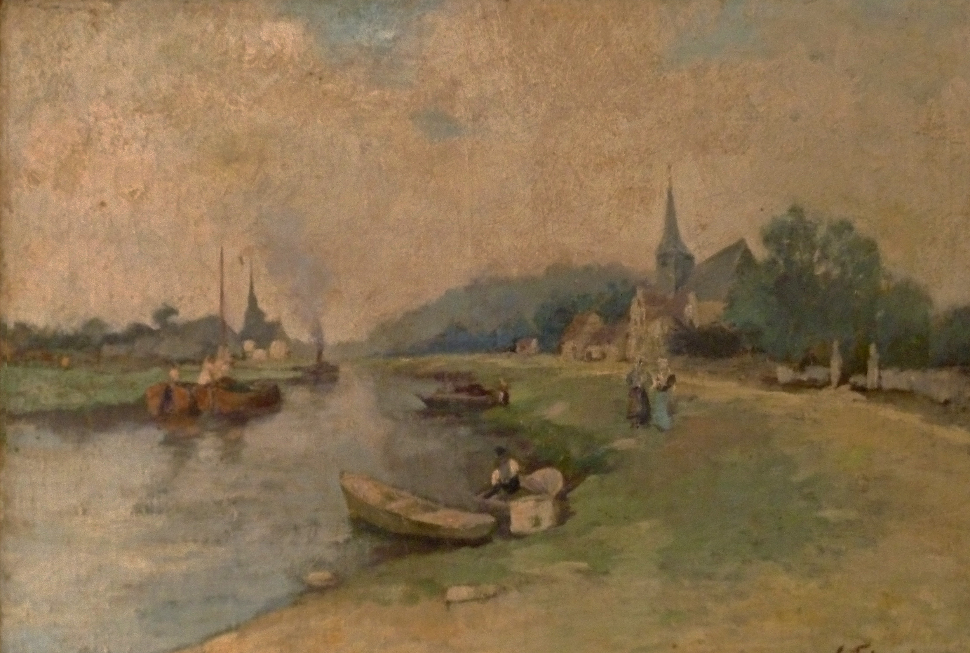 "Geanimeerd rivierlandschap", olieverf op doek (38 x 60 cm) door de Belgische kunstschilder Gustave Flasschoen (168-1940); privébezit